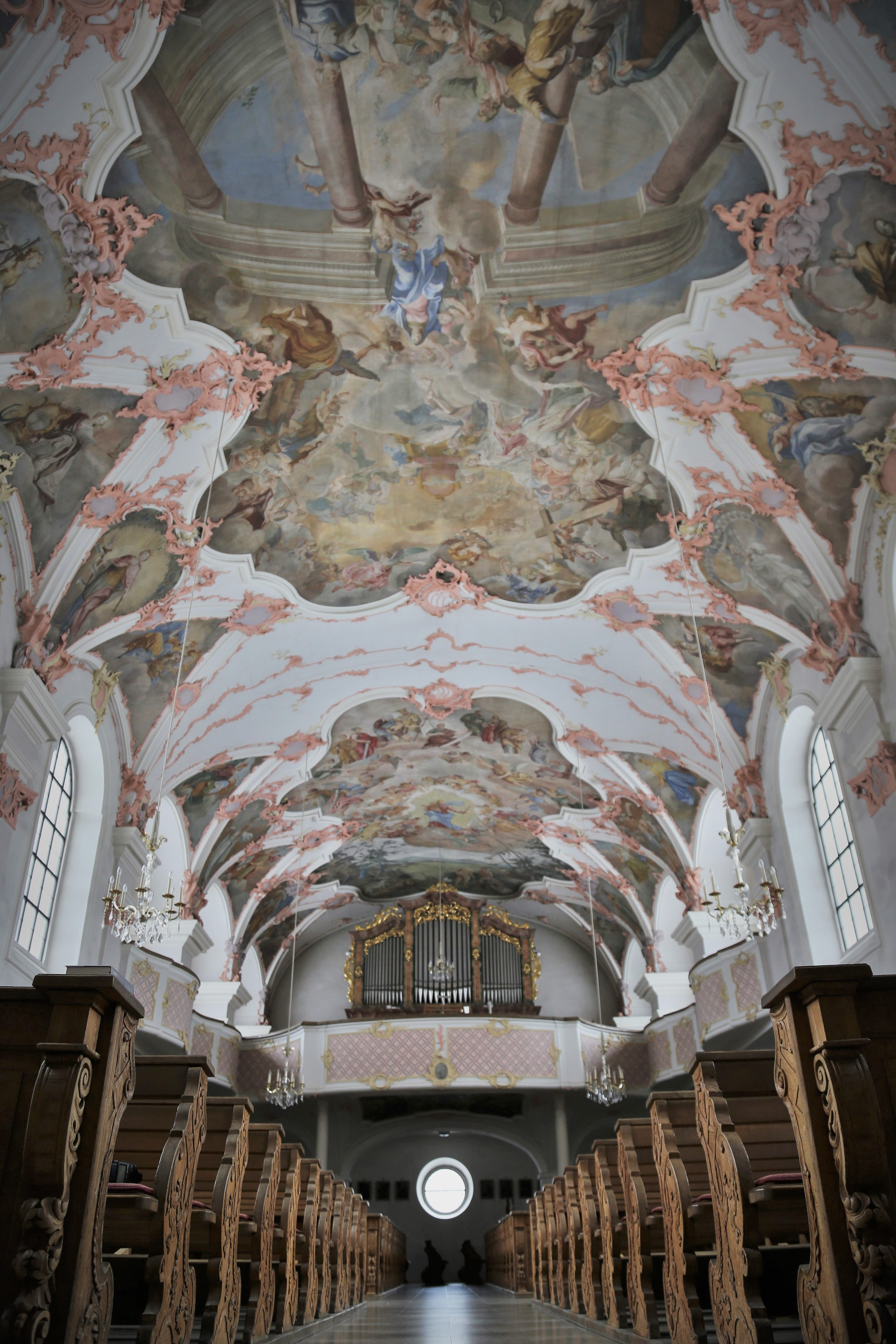 Blick in das Innere der Rokkokokirche "Mariä Himmelfahrt"